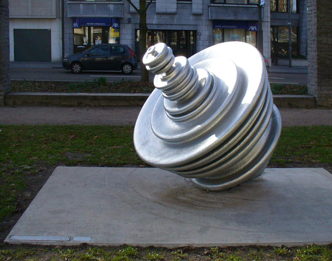 Beeld opgericht als hulde aan de 'meisjes van Philips' in Hasselt.